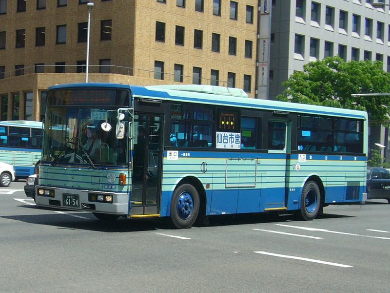 登録番号：宮城22か61-54 仙台市交通局所属